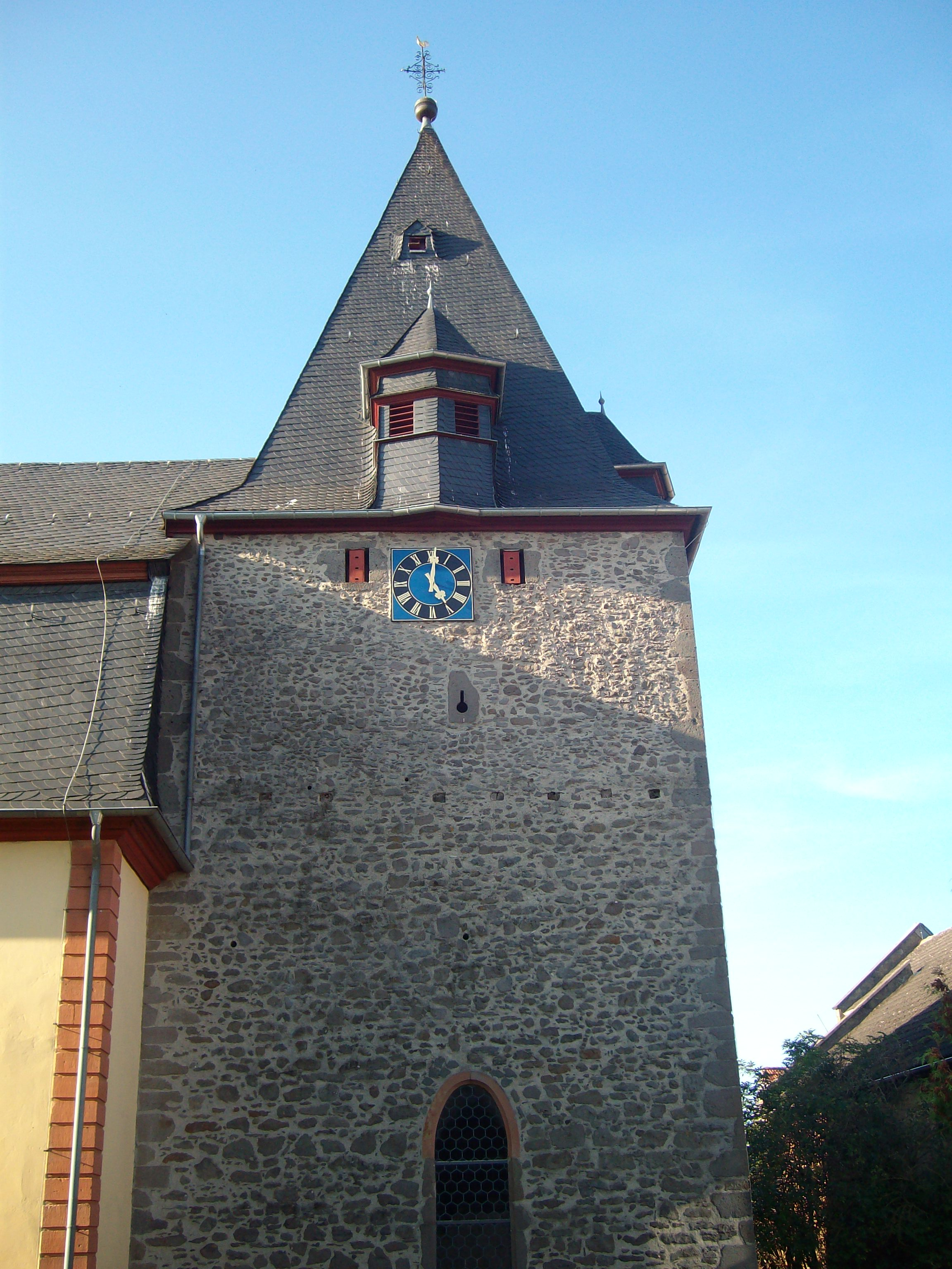 Südseite des Turms der Evangelischen Kirche Freienseen, Laubach, Landkreis Gießen, Hessen, Deutschland